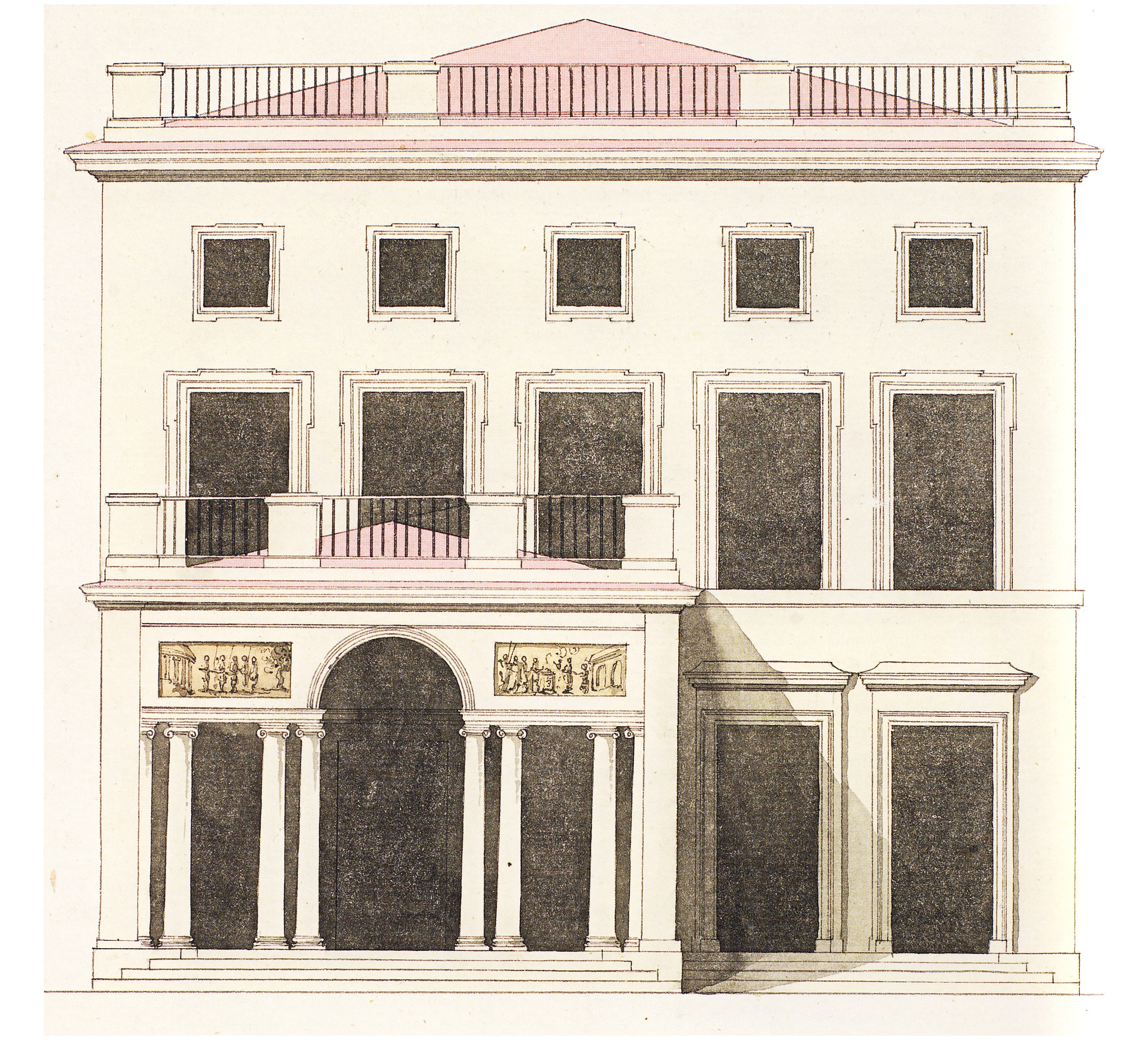 Gustav III:s paviljong i Hagaparken, entréfasad